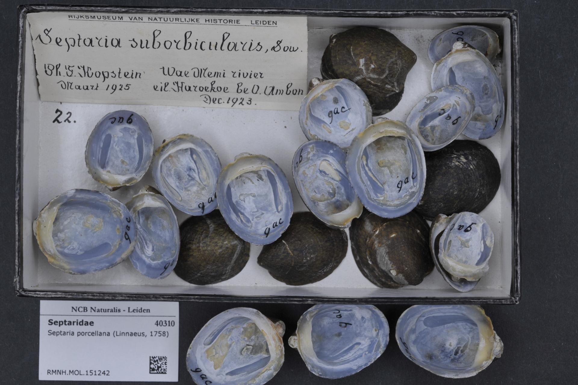 Septaria porcellana (Linnaeus, 1758)